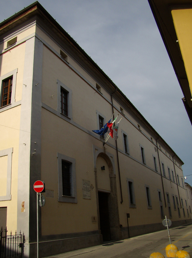 La facciata del Palazzo San Cristoforo a Lodi